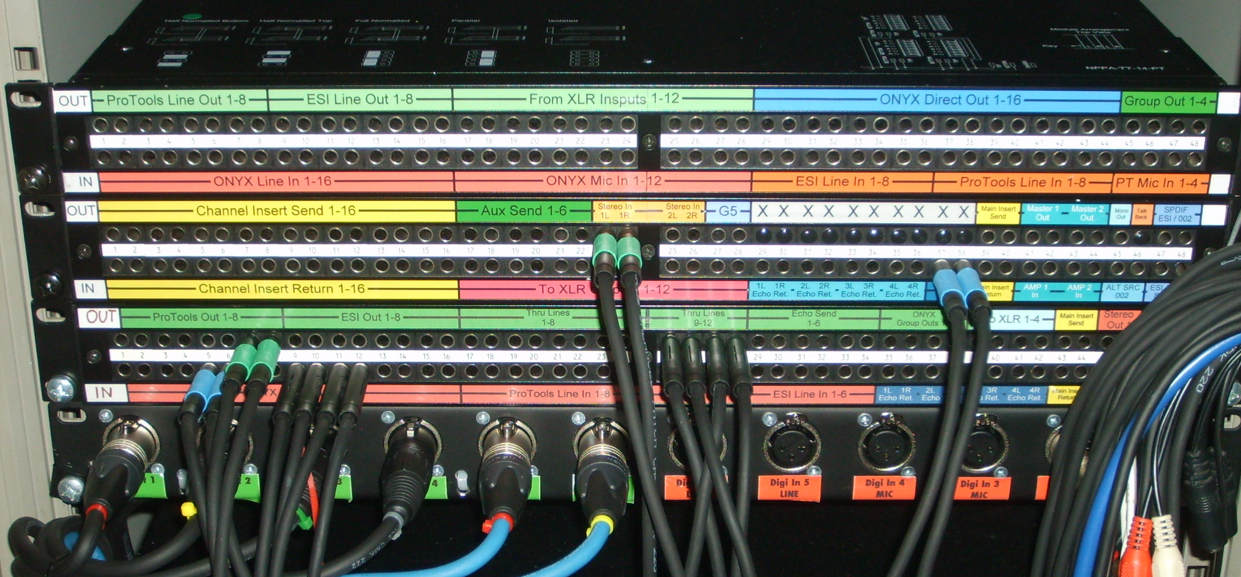 Patchbay_Neutrik_NPPA_14PT